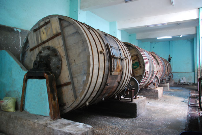 Bosaso Tannery